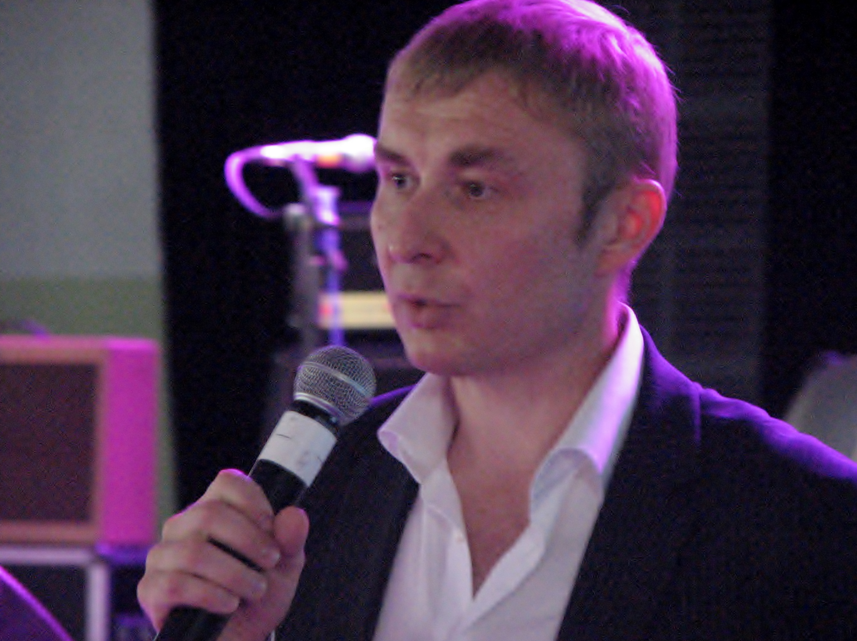 Vladimir Sadekov esinemas Kalevi spordihallis ürituse ROCK IT CON 2013 WEB-B@LTIC raames 25. augustil 2013